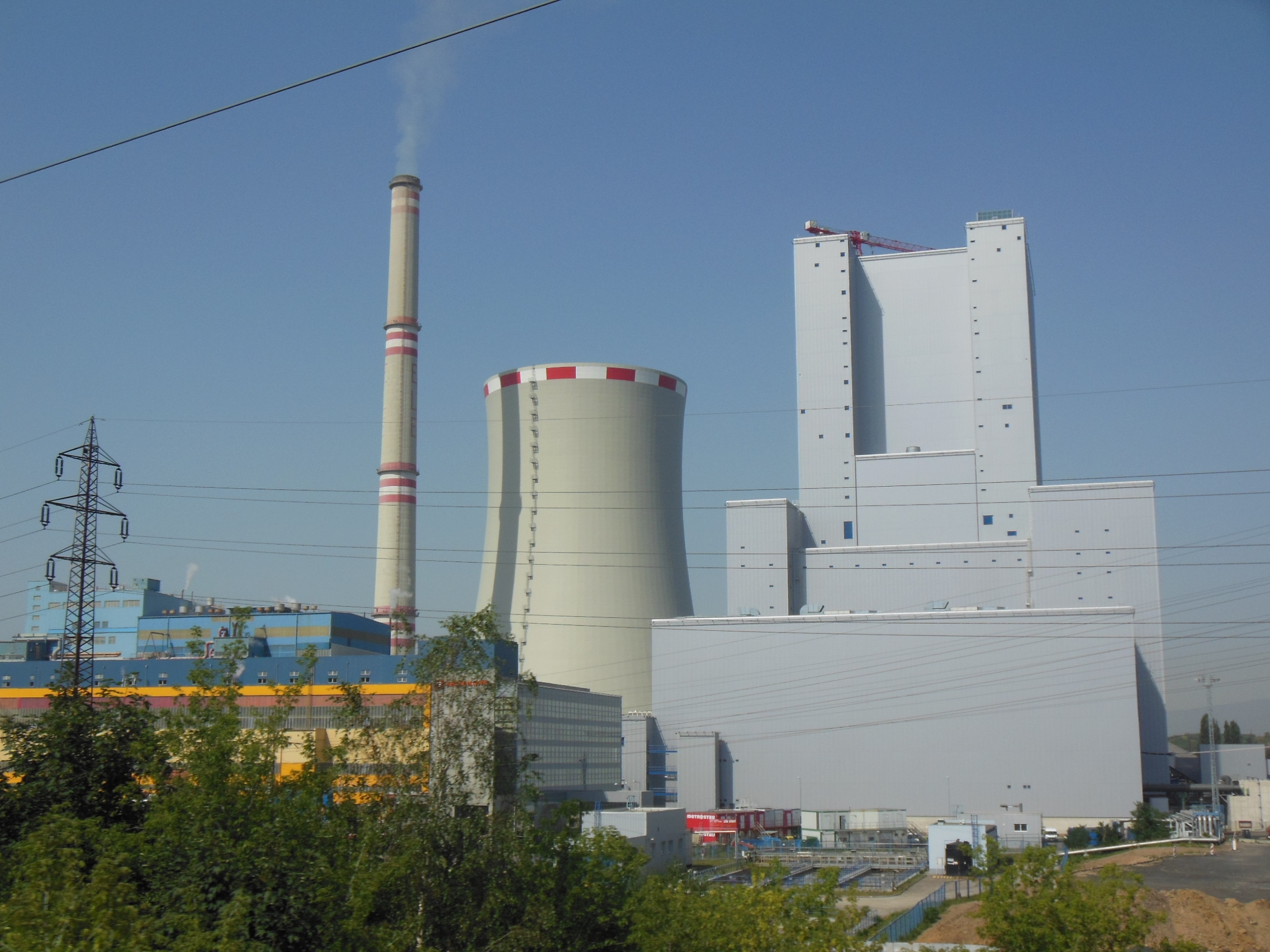 Elektrárna v Ledvicích (okres Teplice).